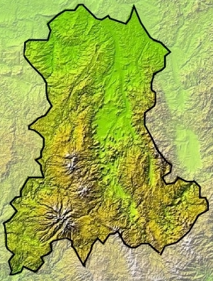 Carte topographique de l'Auvergne